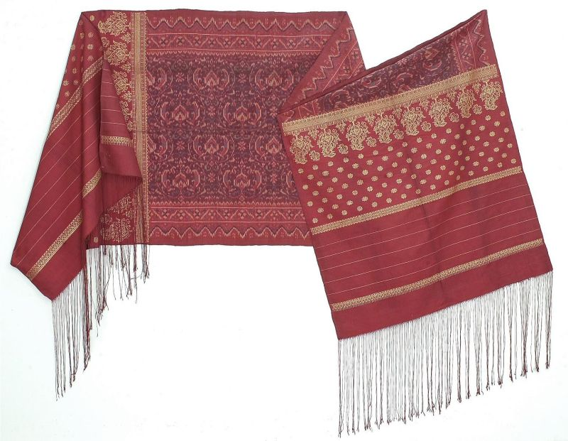 Doek. Ikat doek met gouddraad en franje